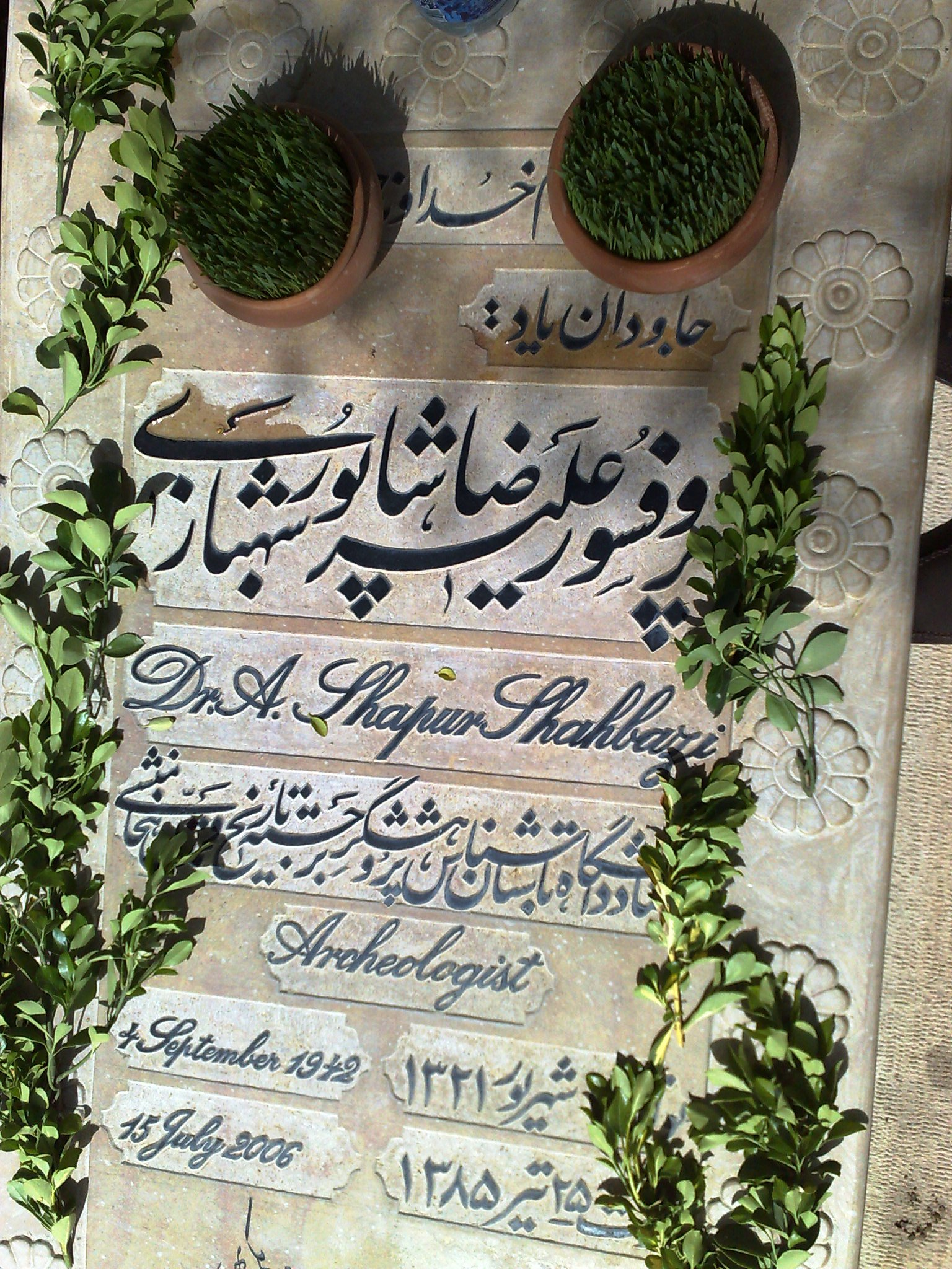 آرامگاه شاپور شهبازی در حافظیهٔ شیراز.